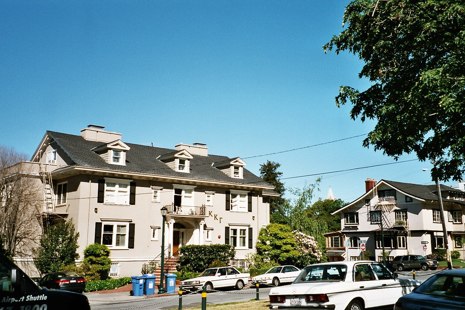 Maison d'une fraternité étudiante, campus de Berkeley, Californie / Photographie personnelle prise par l'utilisateur Urban, au cours d'un voyage en Californie, avril 2004 / GFDL Urban, 2004